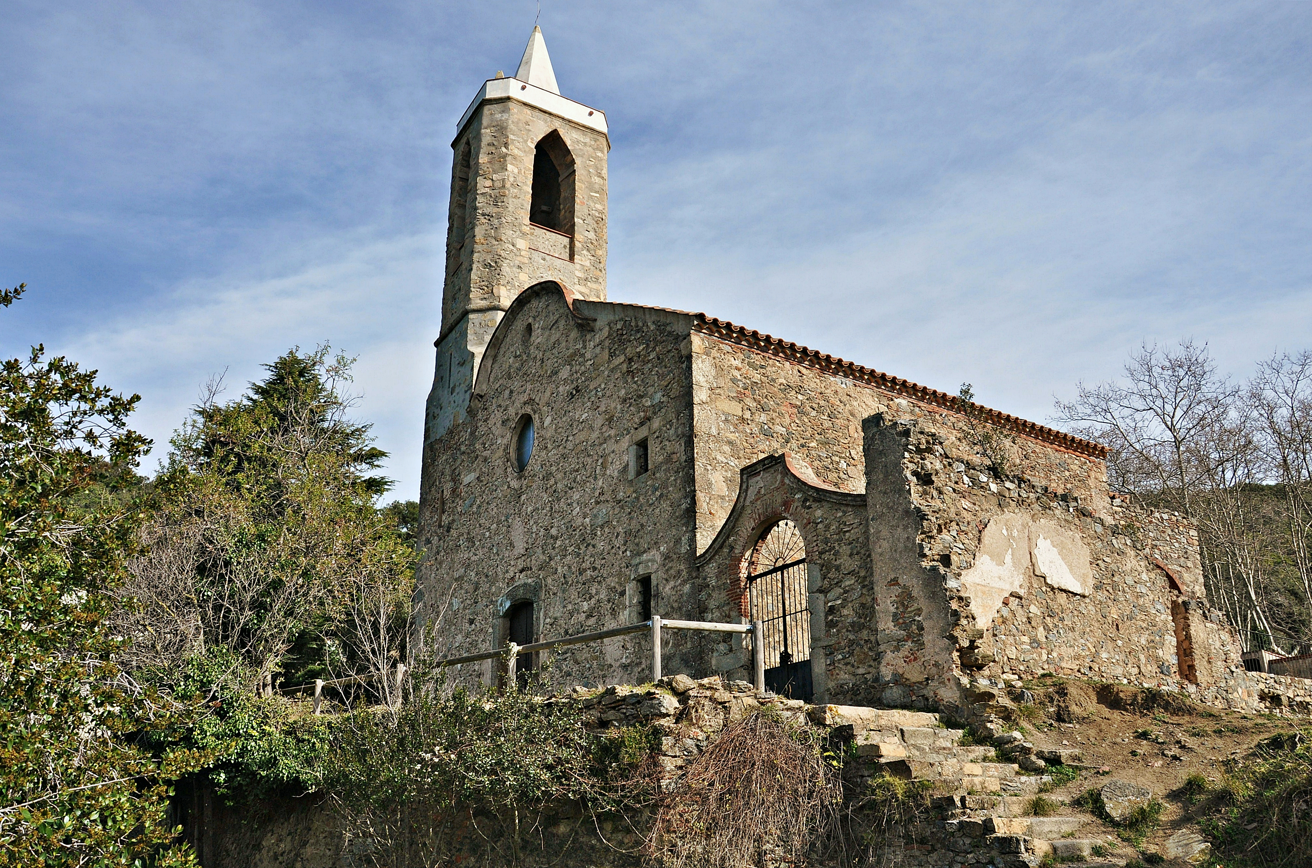 tordera-maresme-cataluña